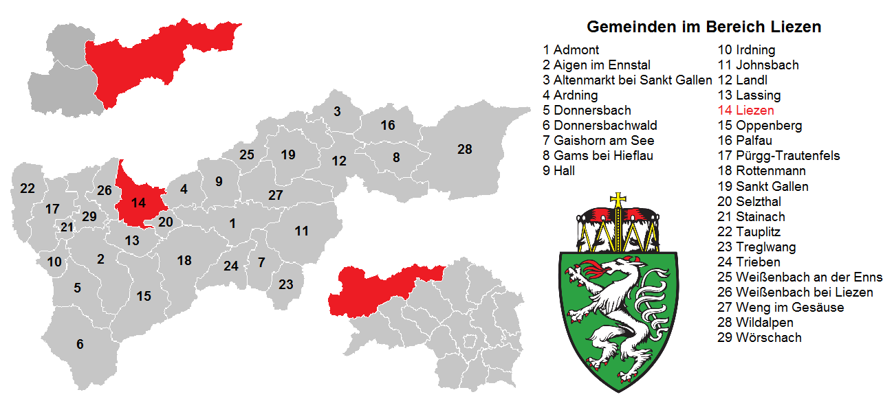 Bereich Liezen